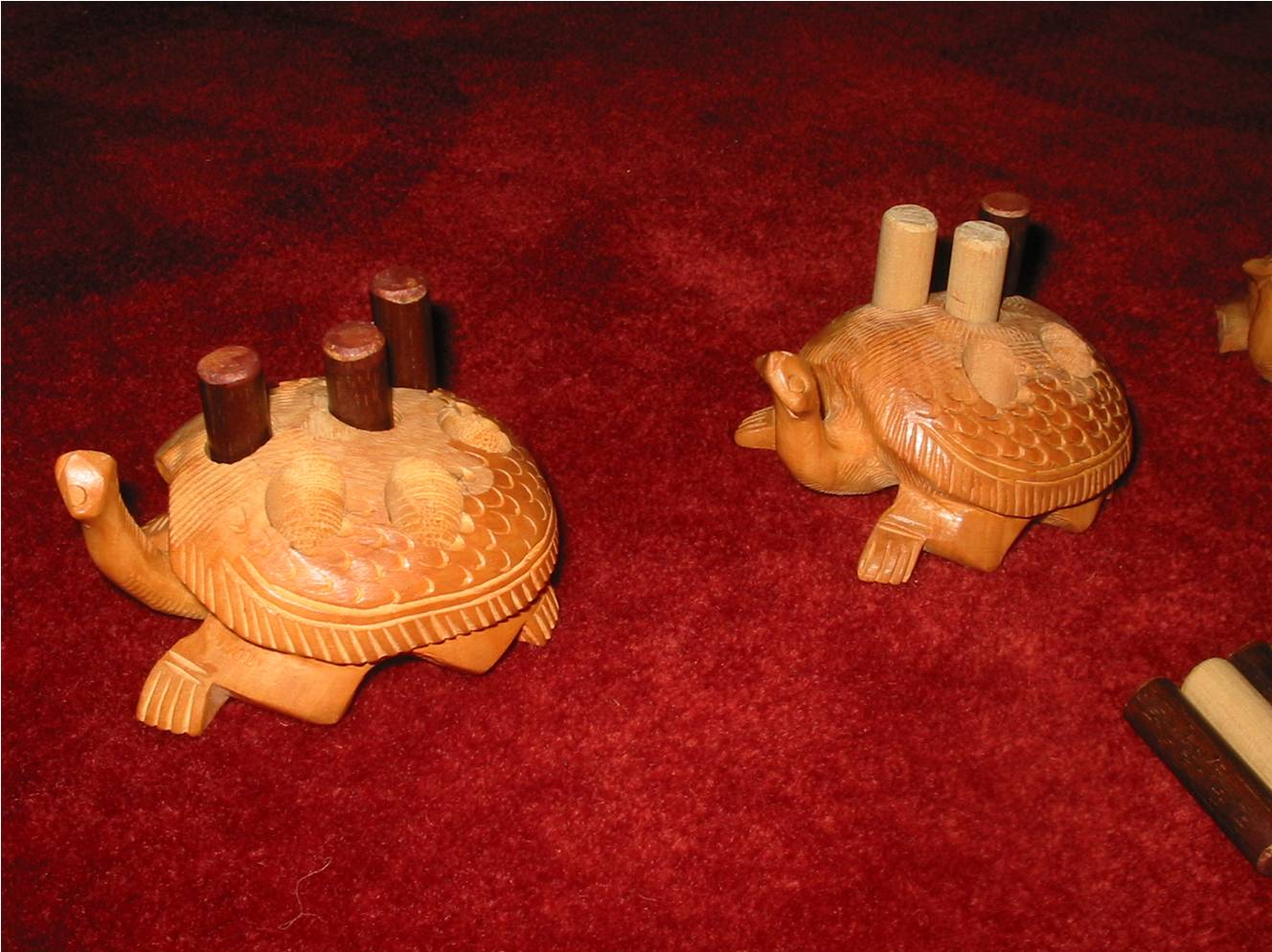 Photographie du matériel du prototype de jeu "Galapagos", qui deviendra le jeu "Apagos".